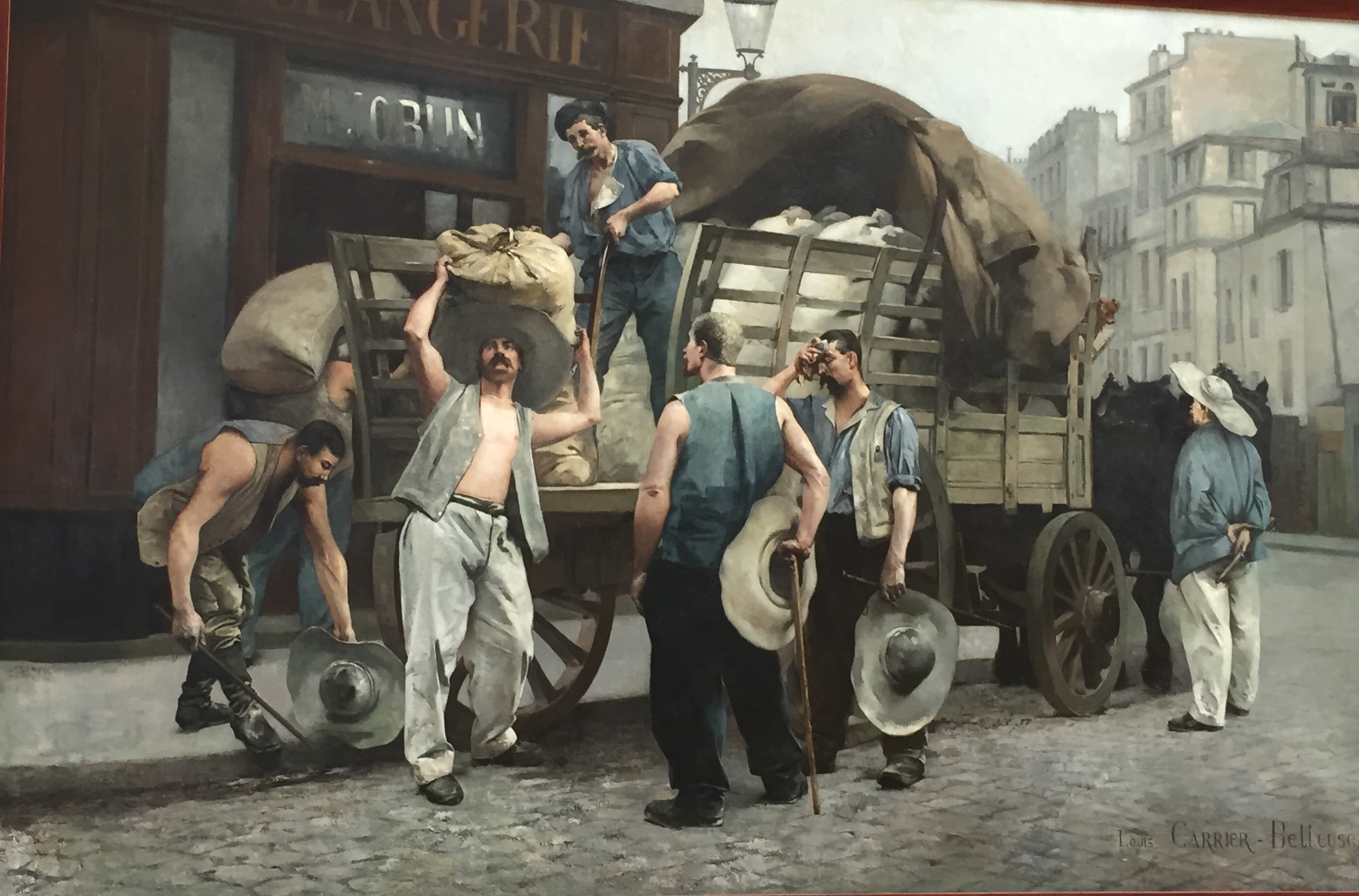 Huile sur toile "Les Porteurs de farine" de Louis Carrier-Belleuse réalisée en 1895. Exposée au Petit Palais à Paris.